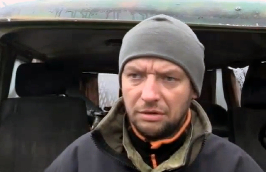 Комбат 25 батальйону «Київська Русь» Андрій Янченко, позивний — «Висота».